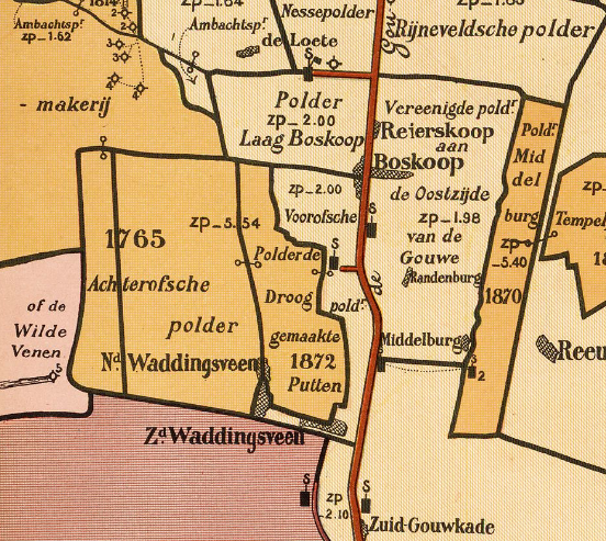 Achterofsche_polder